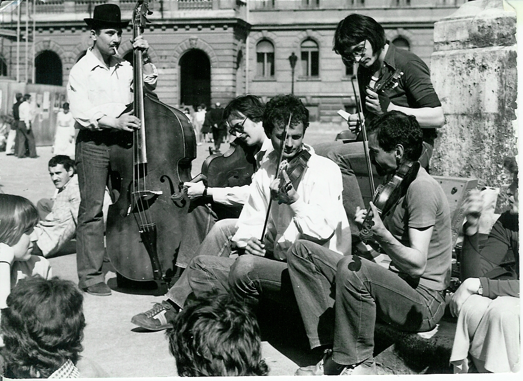 EFE valétálás 1980